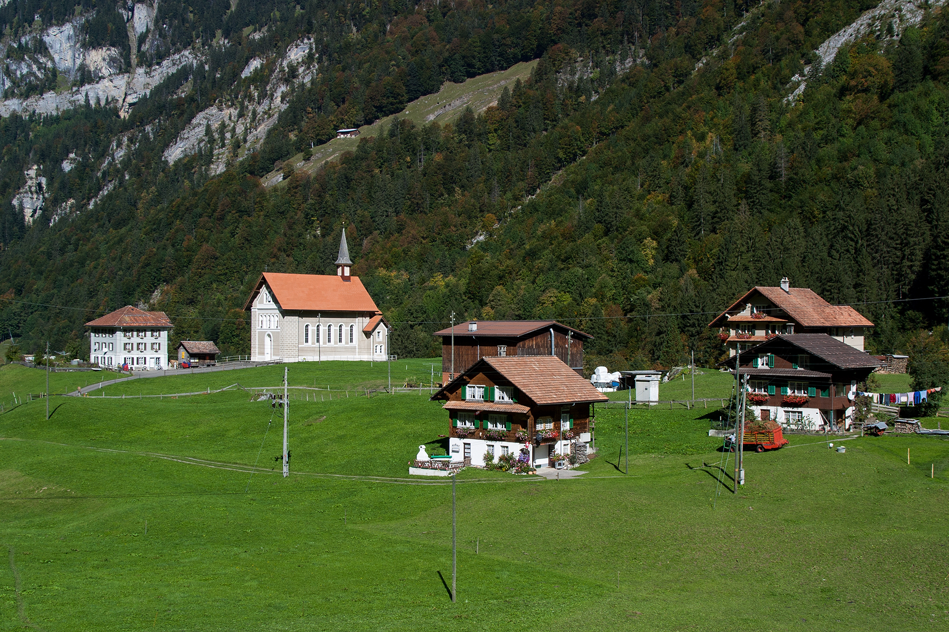 Bisisthal (SZ)